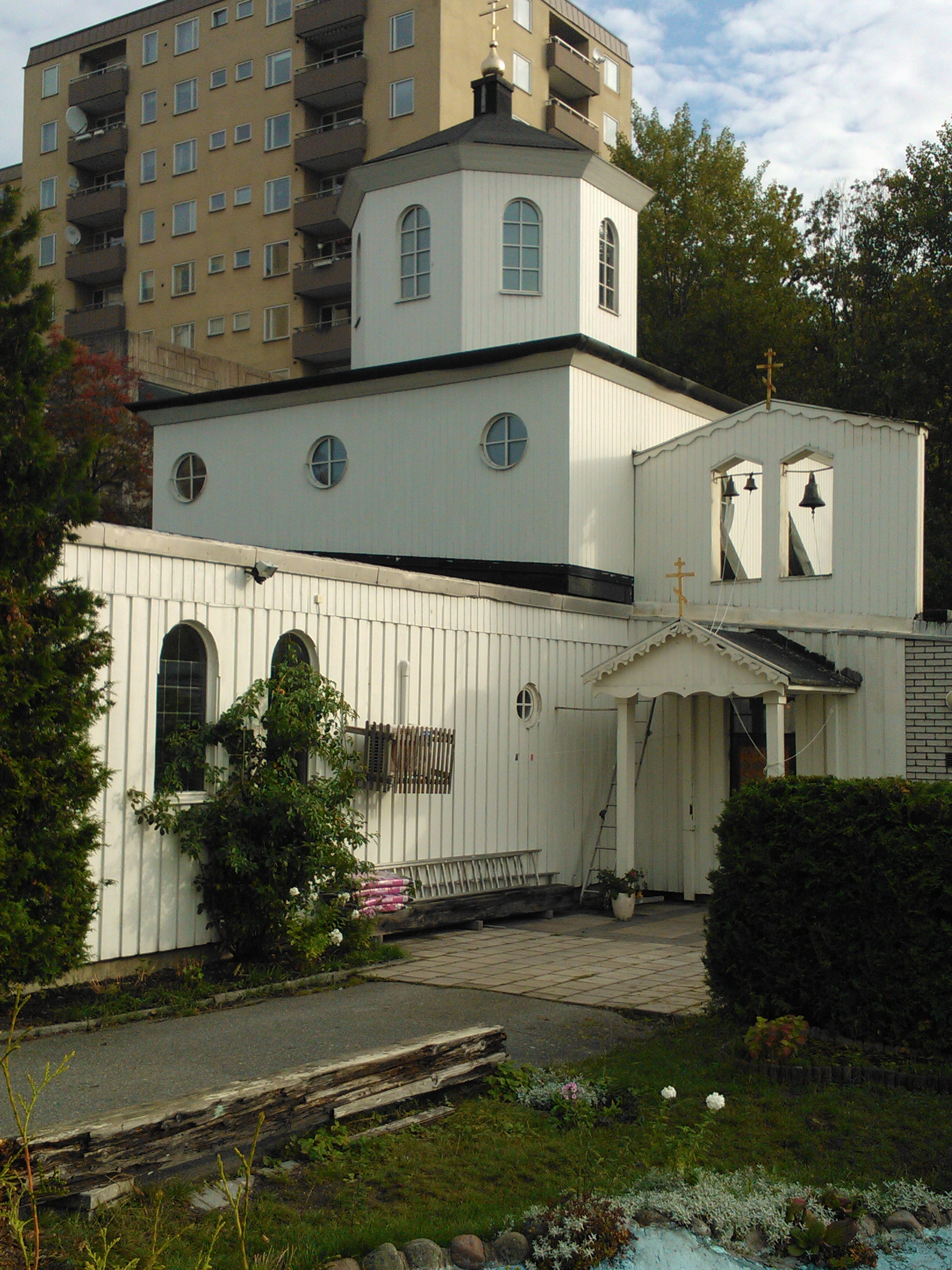 Церковь свв. Константина и Елены (р-н Ворберг, Стокгольм)